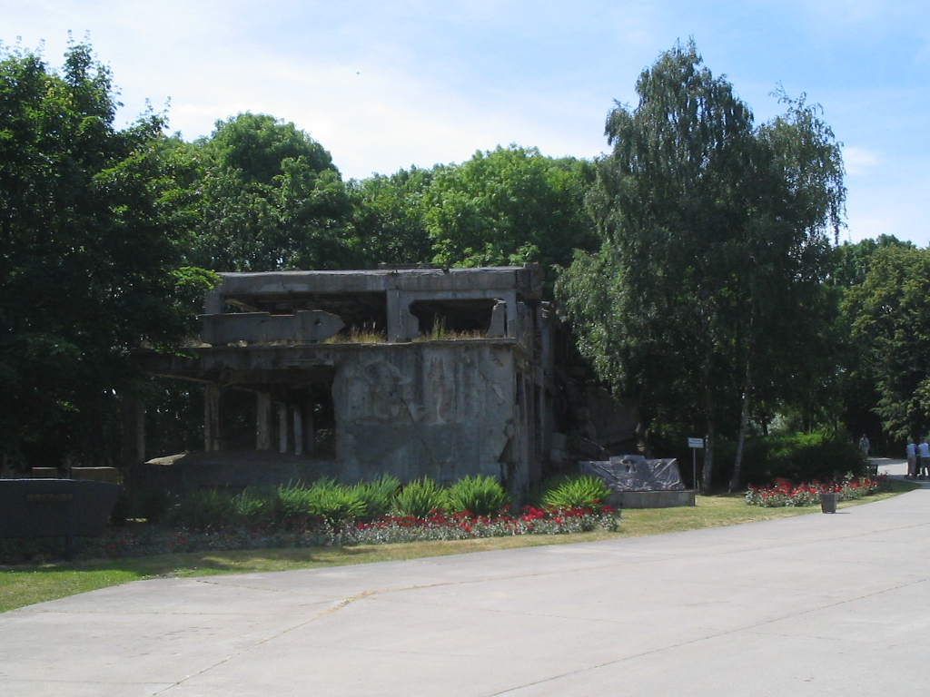 Barrack ruins at Westerplatte, Gdansk, Poland